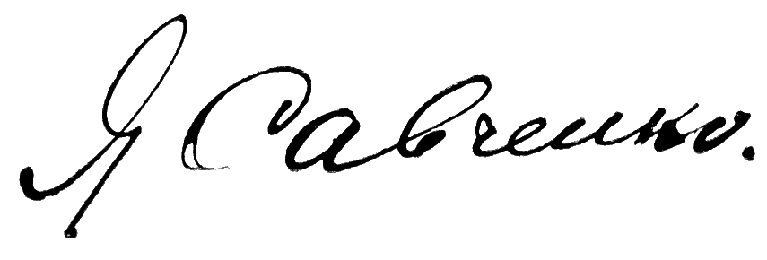 Підпис